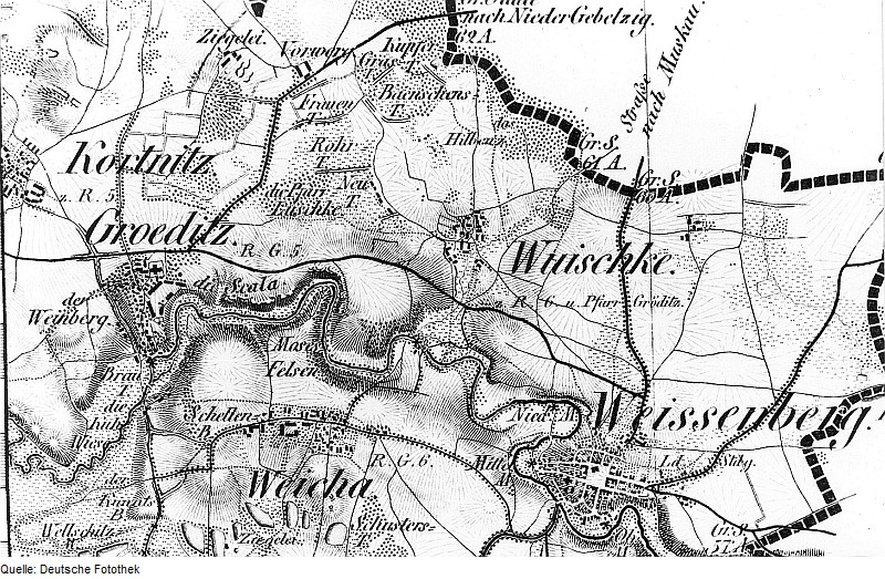 Original image description from the Deutsche Fotothek Weißenberg-Gröditz. Oberreit, Sect. Weißenberg, 1840